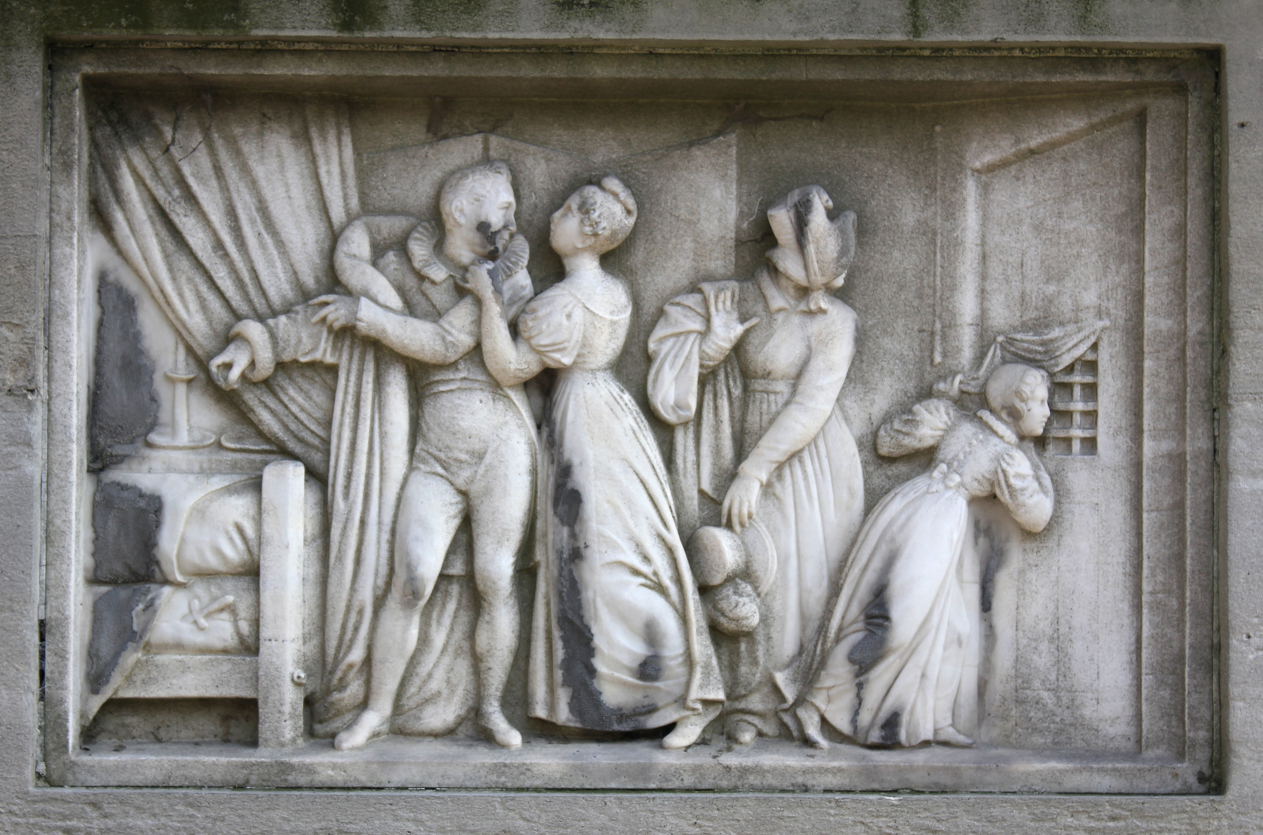 Sépulture d'Antoine Marie Chamans de Lavalette (1769-1830), eofficier et haut fonctionnaire. Monument comportant un buste en fonte dans une niche et un bas-relief en marbre représentant l'épisode de l'évasion de M. Lavalette.bas-relief